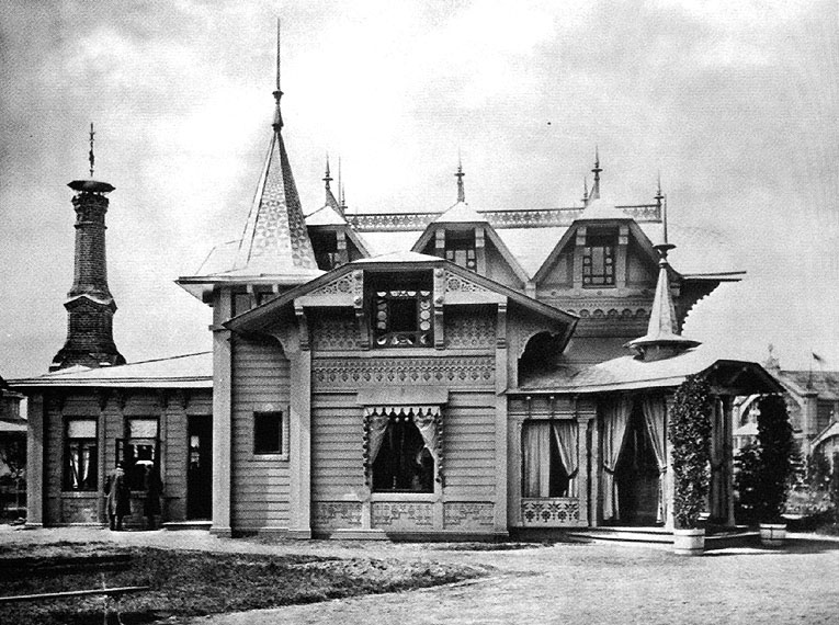 Moscow, Exhibition Pavillion of Abrikosov Factories. Draft by Alexander Kaminsky, completed by Ilya Bondarenko, 1890Павильон т-ва Абрикосовых на московской выставке 1890. Арх. А. С. Каминский (проект), И. Е. Бондаренко (постройка)